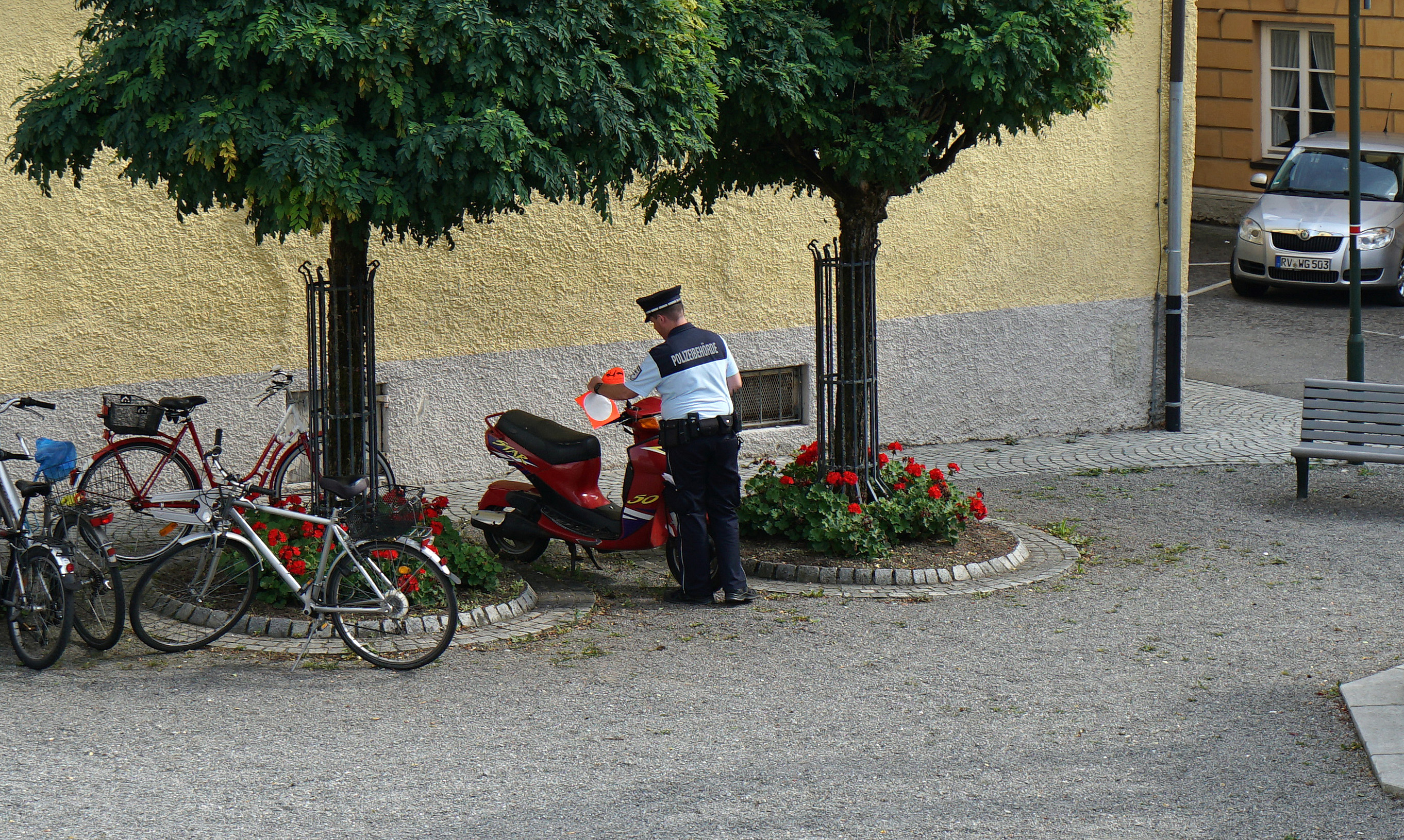 Ein Mitarbeiter einer Polizeibehörde stellt auf dem Gut-Betha-Platz in Bad Waldsee in Baden-Württemberg eine Ordnungswidrigkeit fest: Das markierte Kraftfahrzeug, das ohne Kraftfahrzeug- und Versicherungskennzeichen abgestellt ist und nicht zum Straßenverkehr zugelassen ist, nimmt öffentlichen Verkehrsraum über den Gemeingebrauch hinaus in Anspruch. Diese unerlaubte Sondernutzung wird als Ordnungswidrigkeit eingestuft, die aufgrund § 16 und § 54 Straßengesetz für Baden-Württemberg mit einer Geldbuße geahndet wird. Mit dem angebrachten roten und runden Zettel wird die Halterin/der Halter aufgefordert, das mit diesem Zettel versehene Fahrzeug innerhalb einer Woche zu entfernen, ansonsten wird es kostenpflichtig abgeschleppt werden.